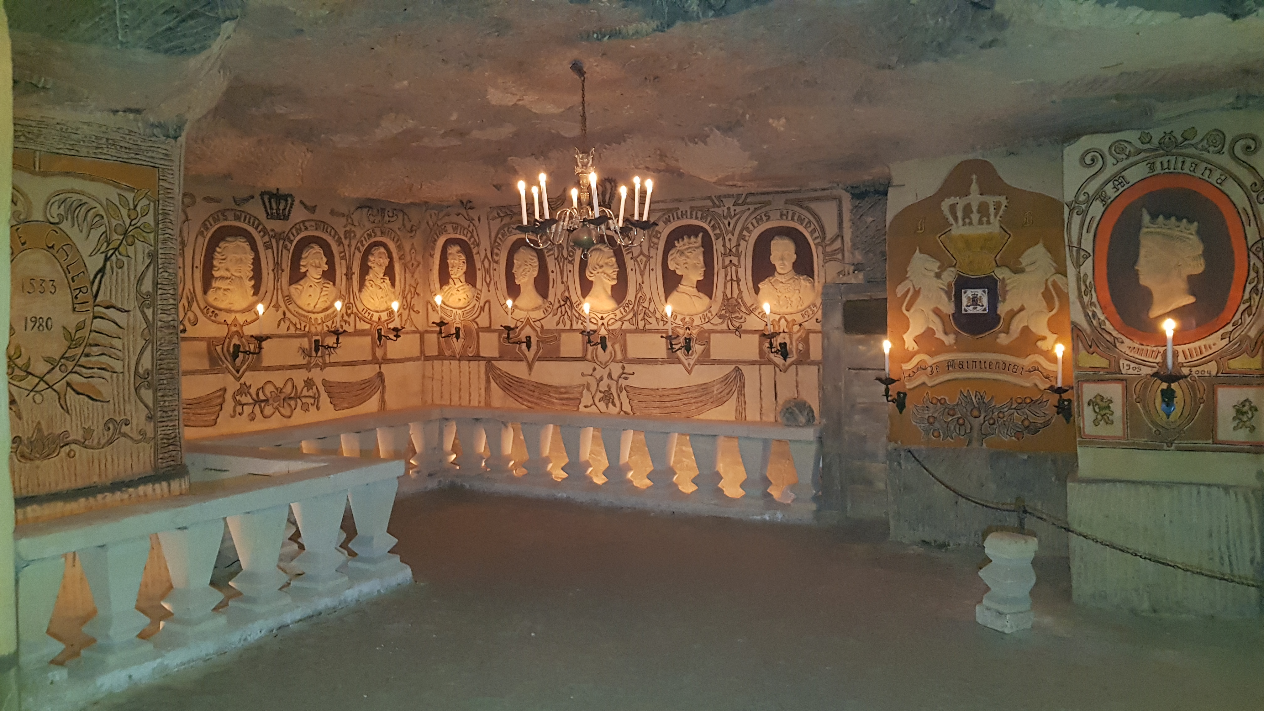 Oranjegalerij in de Geulhemmergroeve, Geulhem, Nederland